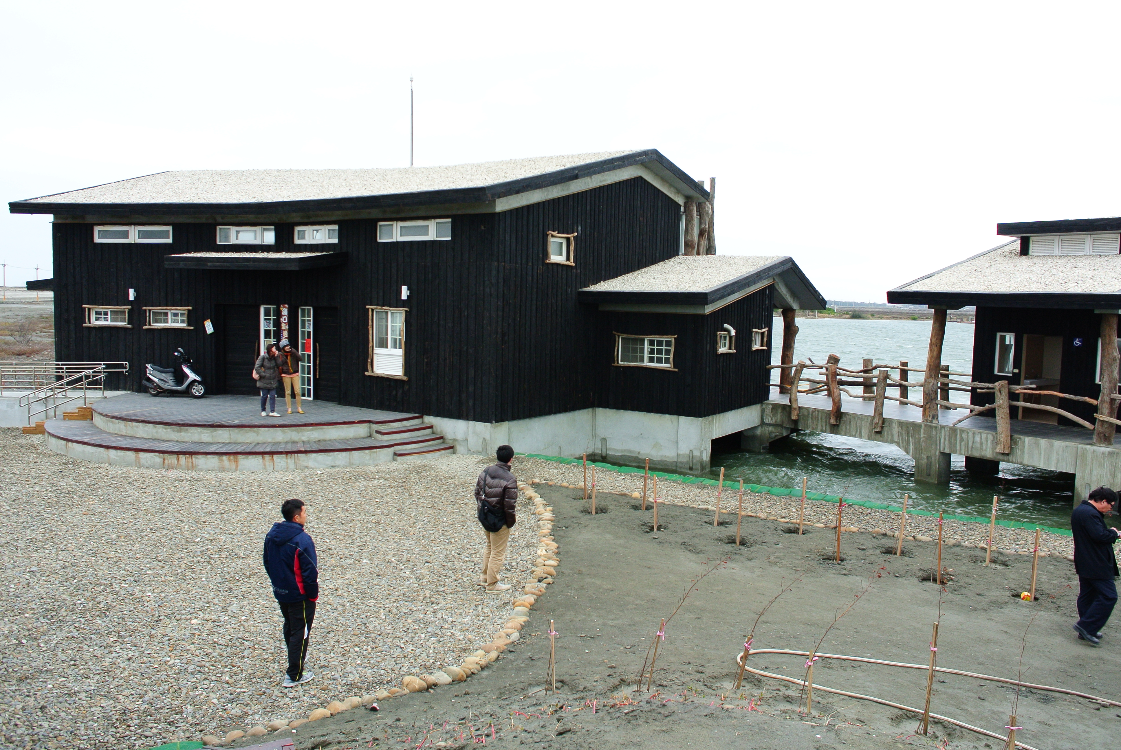 中文（台灣）: 雲林縣臺西鄉臺西海口生活館。